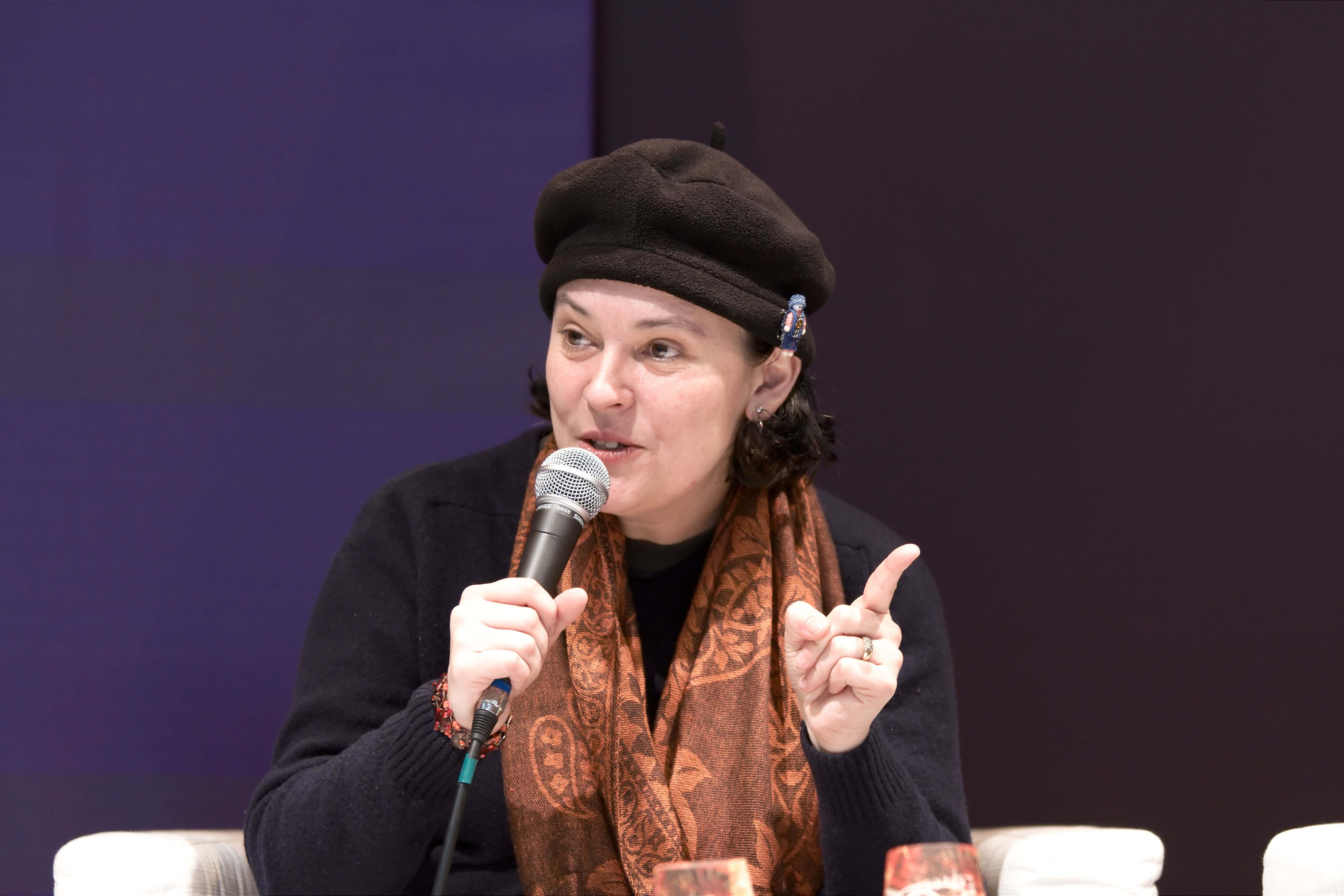 La poétesse Valérie Rouzeau au Salon du livre de Paris pour une rencontre avec des élèves de 3ème de différents collèges d'Île-de-France.